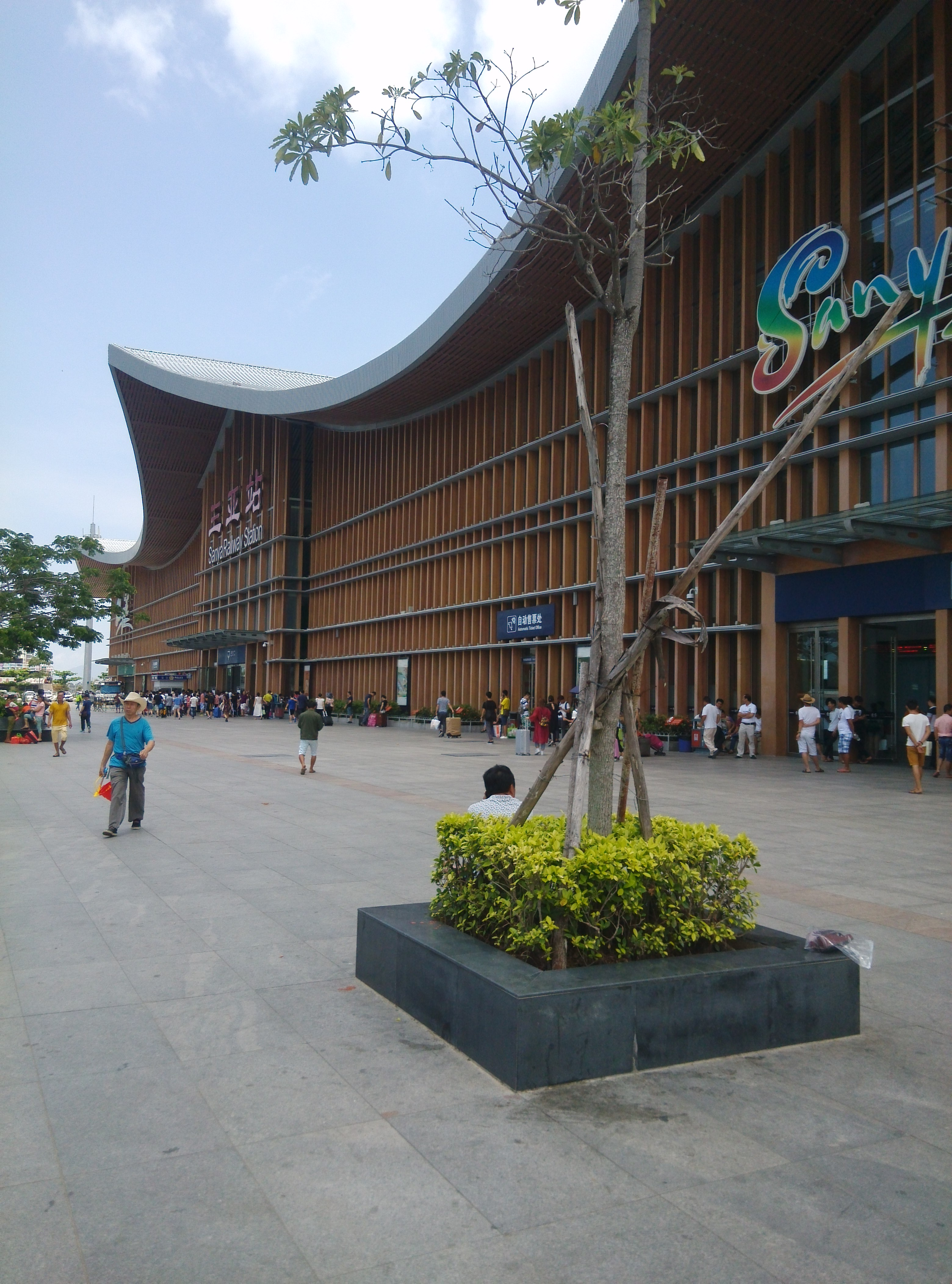 三亜駅駅舎(右側面からの撮影)。かなり巨大。